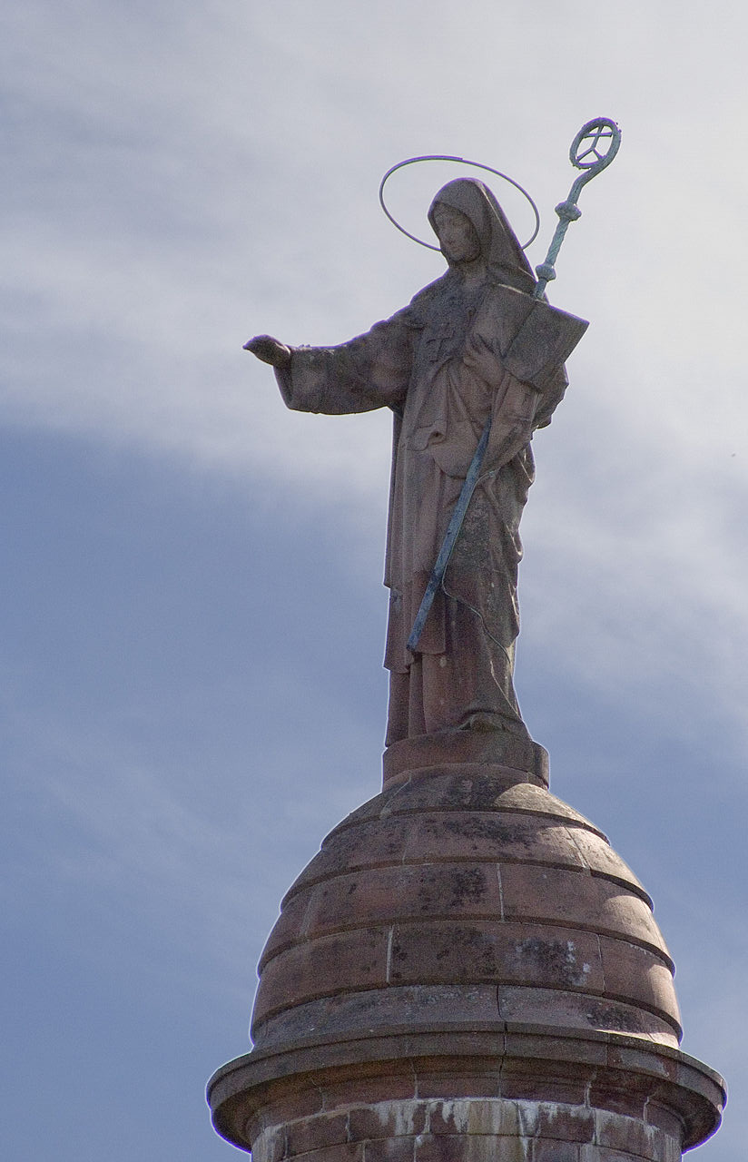 Statue de Sainte Odile au monastère du Mont Sainte-Odile, Alsace, France.